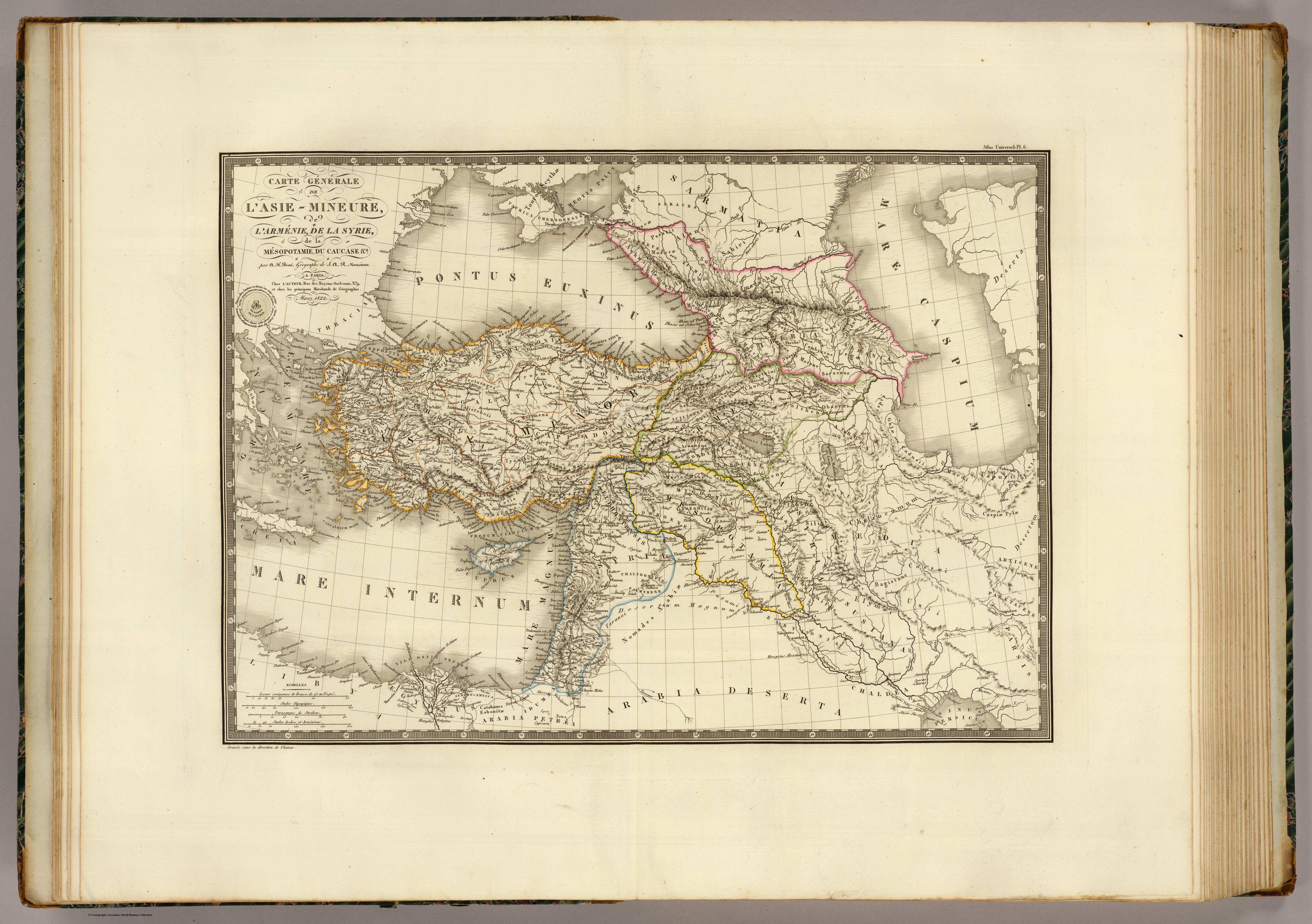 Carte generale de l'Asie-Mineure, de l'Armenie, de la Syrie, de la Mesopotamie, du Caucase &a. par A.H. Brue, Geographe de S.A.R. Monsieur. A Paris, Chez l'Auteur, rue des Macons-Sorbonne, no. 9, et chez les principaux marchands de geographie. Mars 1822.